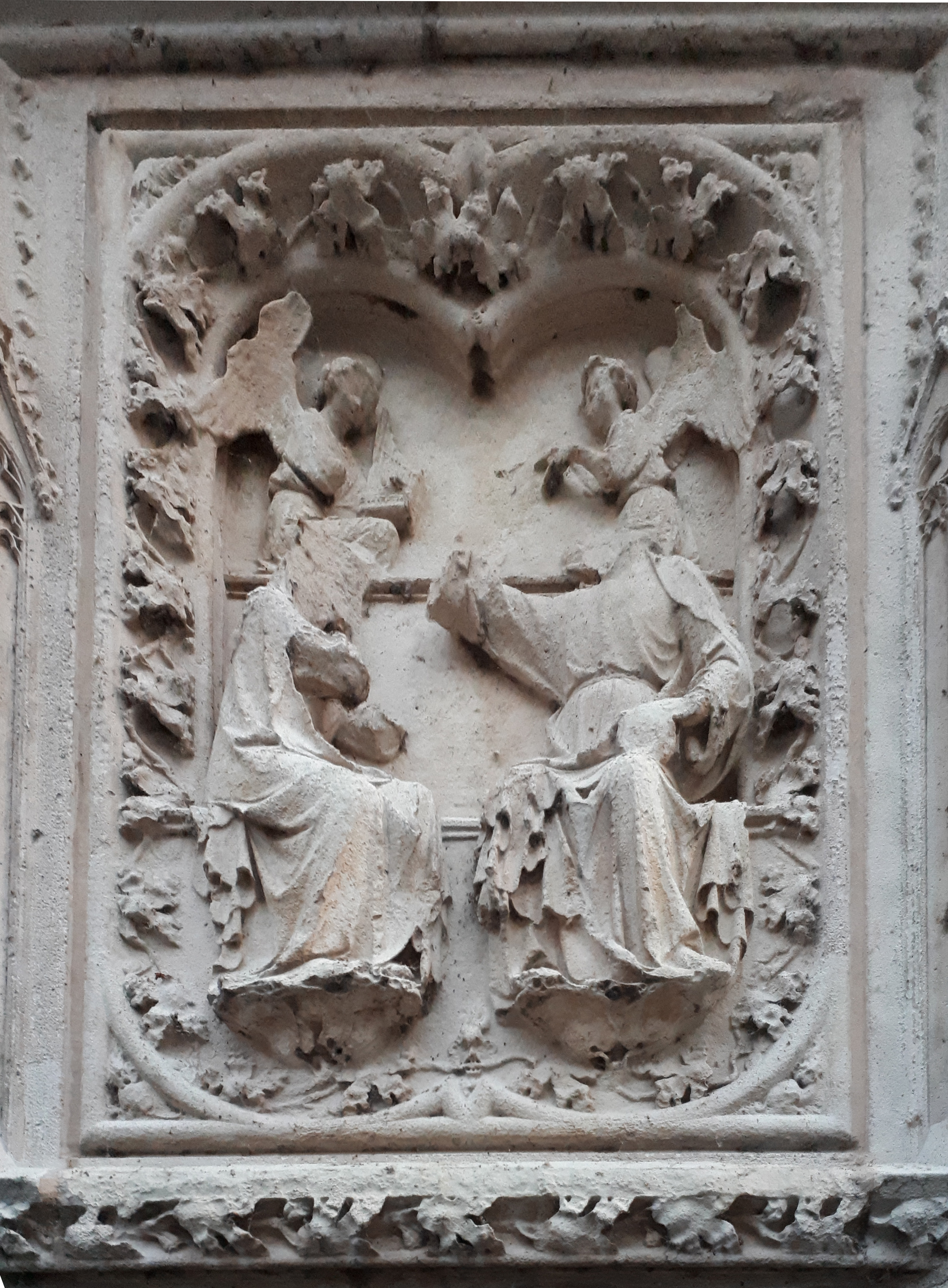 L'incoronazione della Vergine.